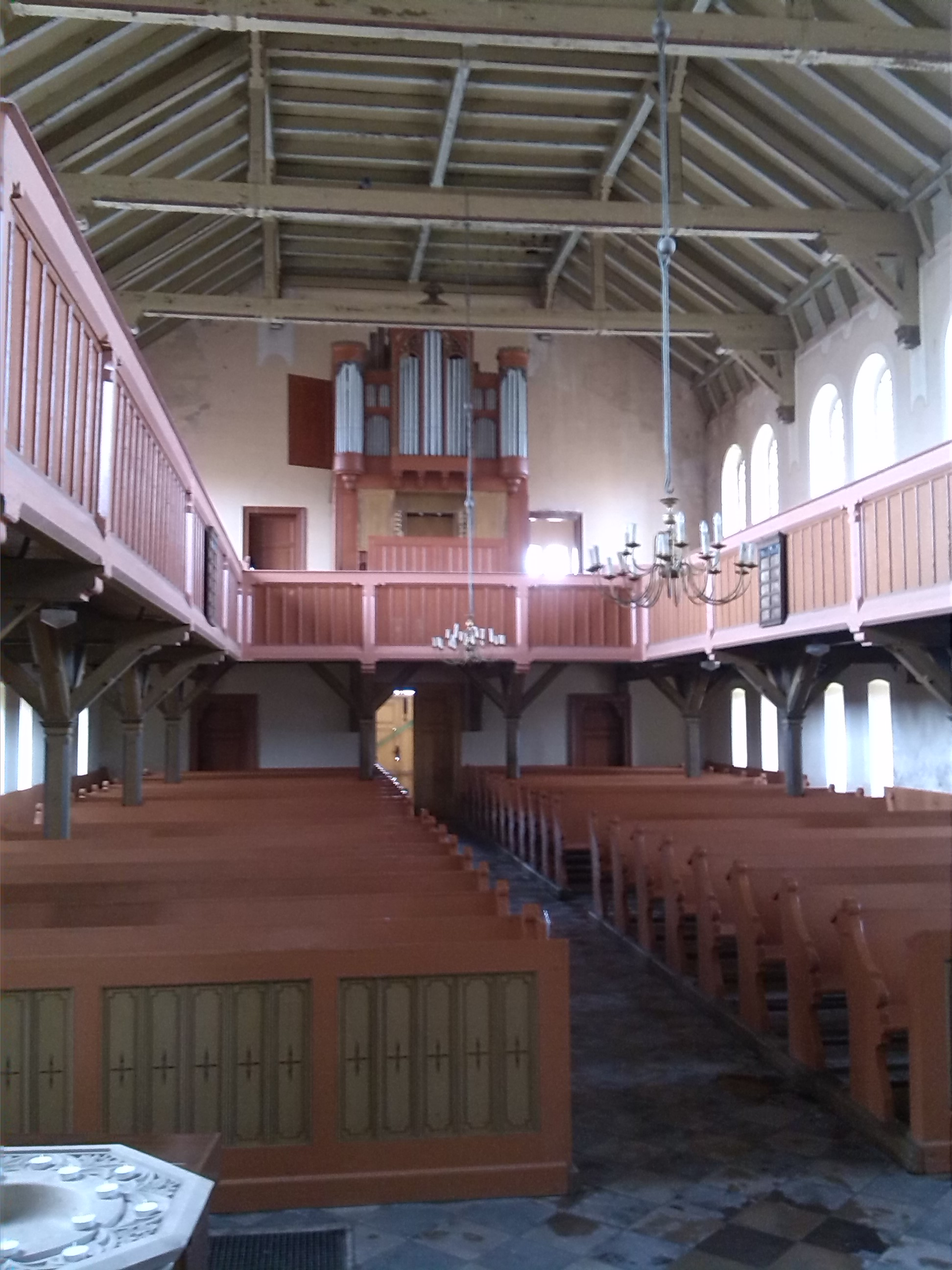 Innenraum mit (westlicher) Empore und Terletzki-Orgel